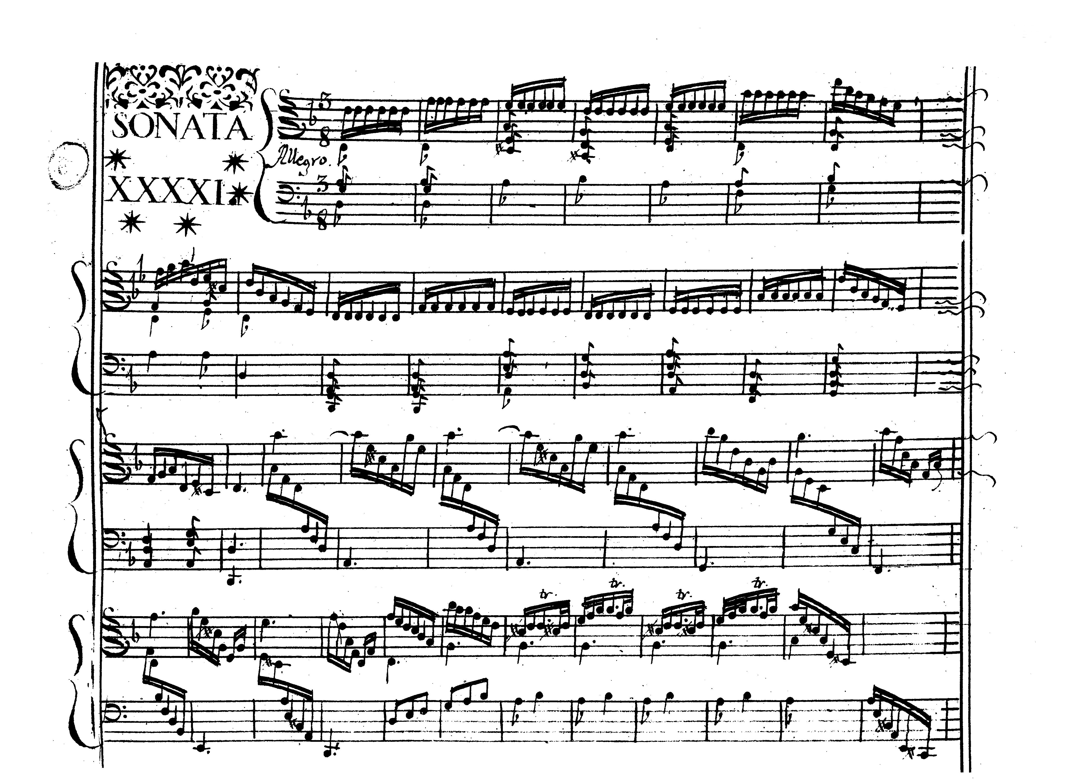 Le début de la sonate K. 141 du « manuscrit Worgan », Londres, British Library, Ms. add. 31553.